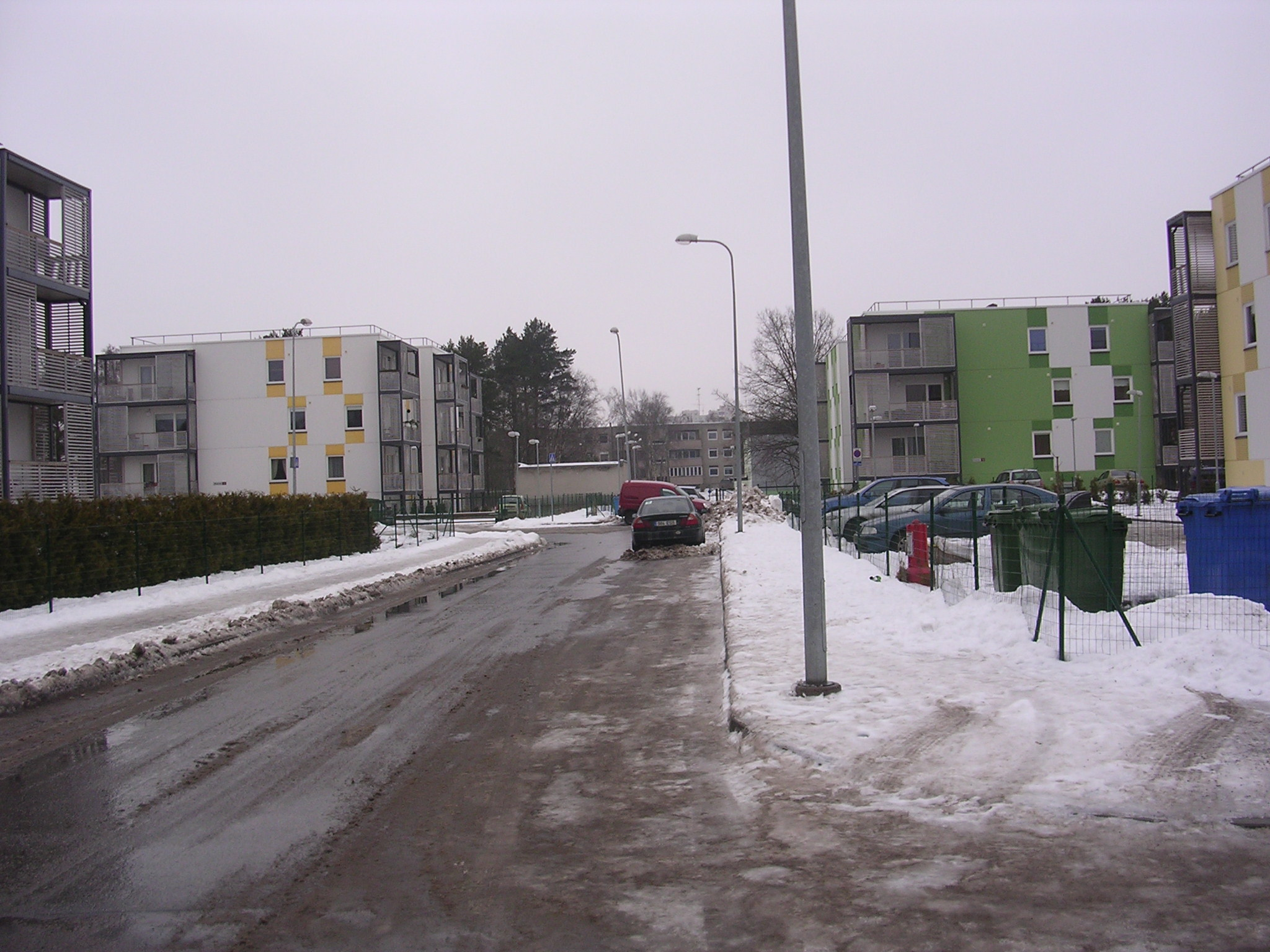 Karukella tee